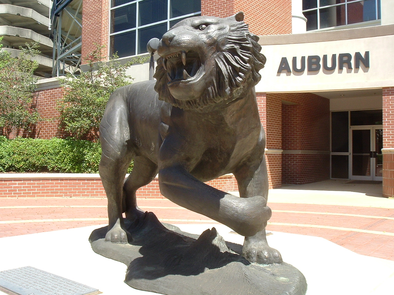 Monument outside Jordan-Hare Stadium